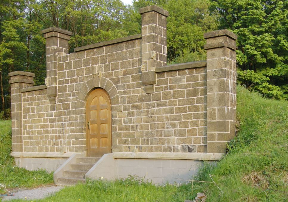 Historischer Wasserbehälter Wuppertal Langerfeld Ehrenberg. Erbaut 1902 bis 1904 nach den Entwürfen von Prof. Otto Intze